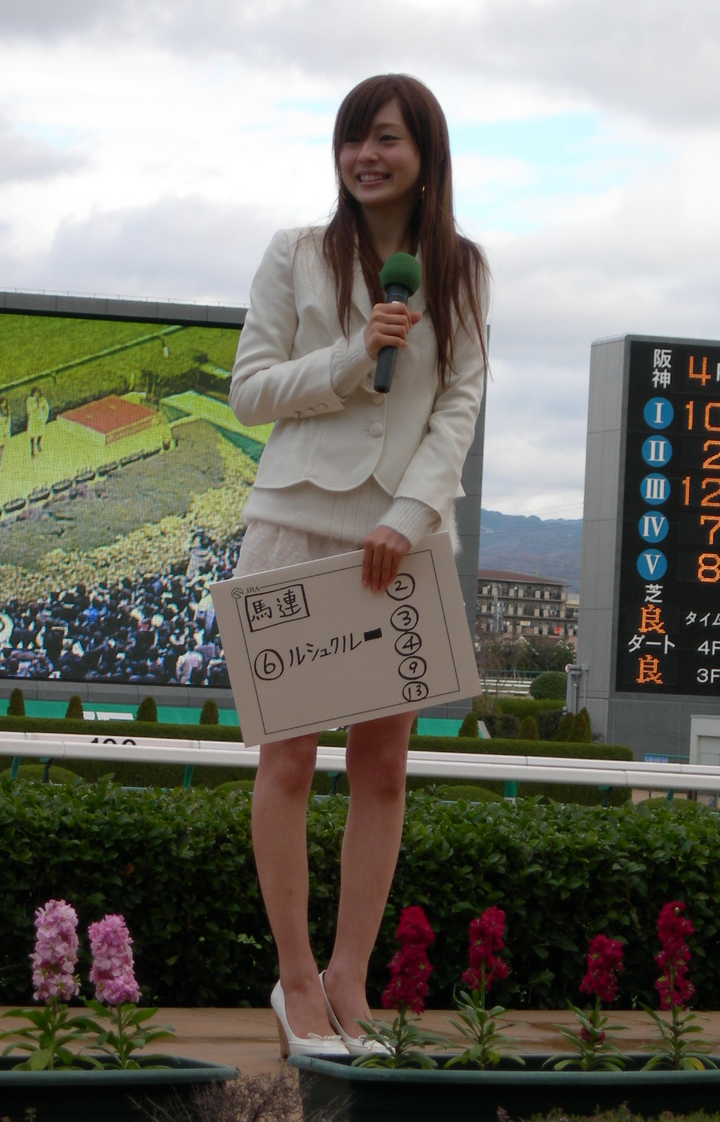 今井りか